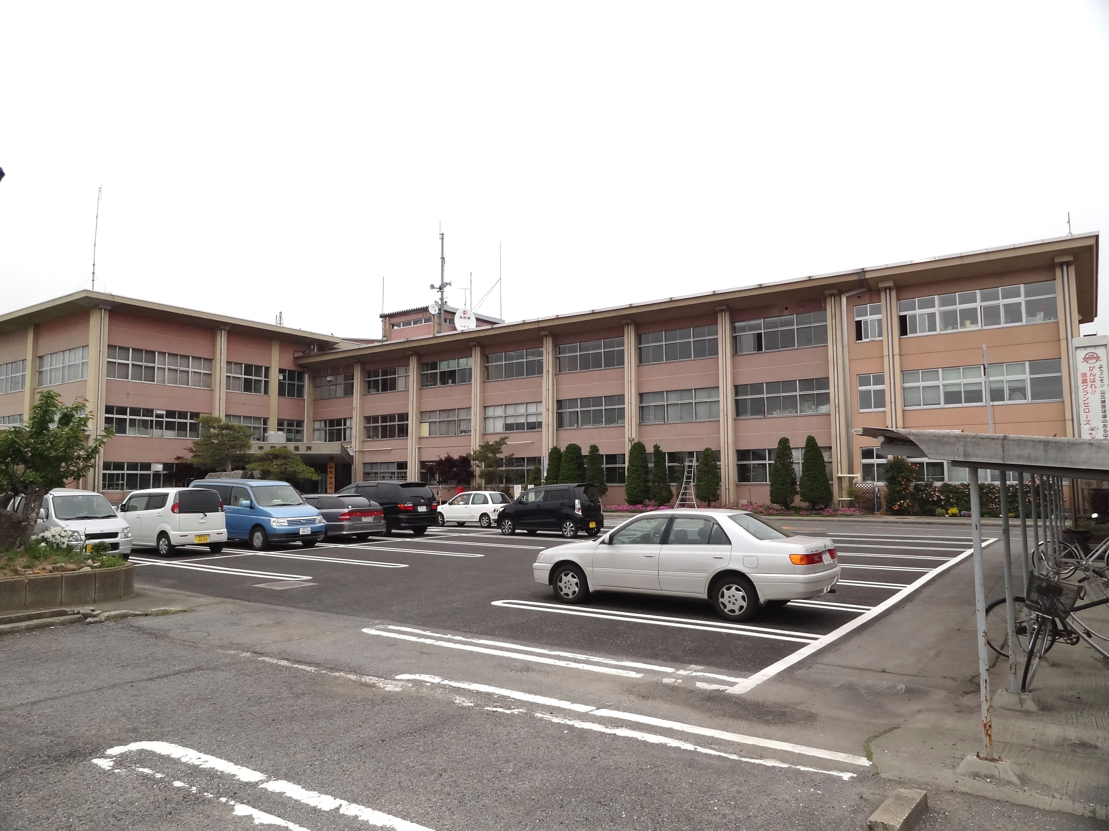 中野市役所